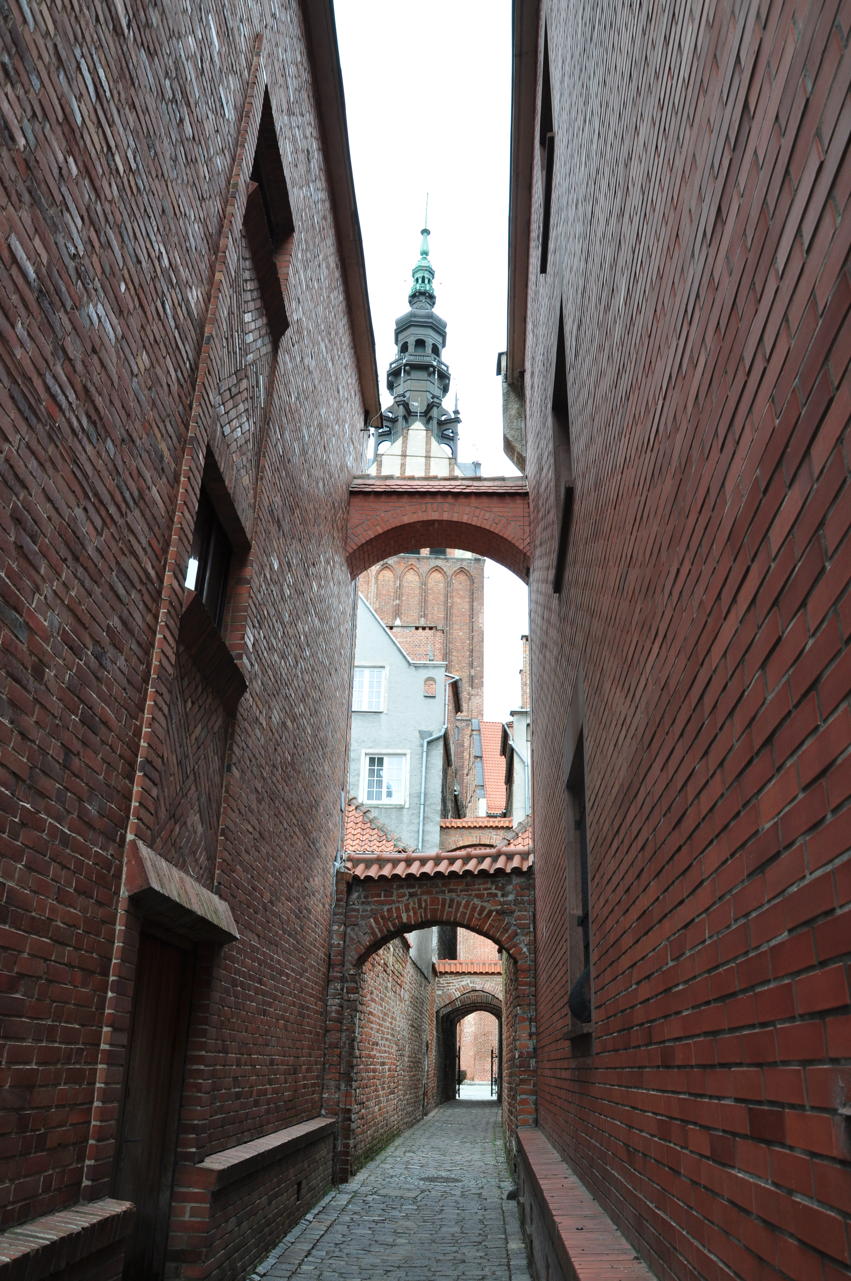 Elbląg - ul. Wigilijna, ścieżka kościelna (zabytek nr rejestr. A-1189)